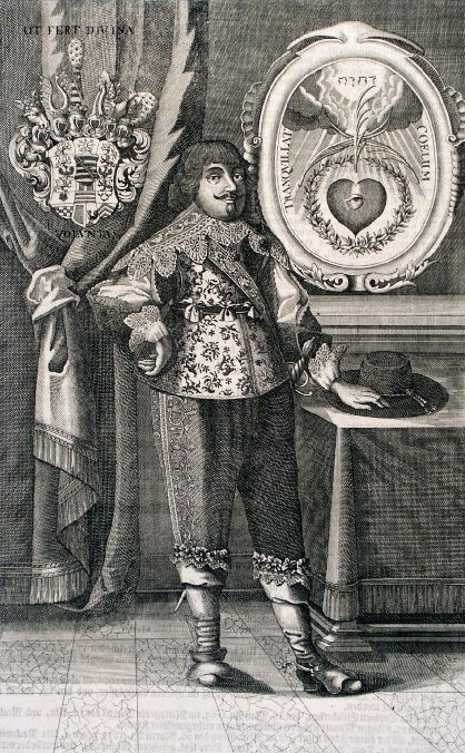 Duke Albrecht of Saxe-Eisenach (1599-1644)